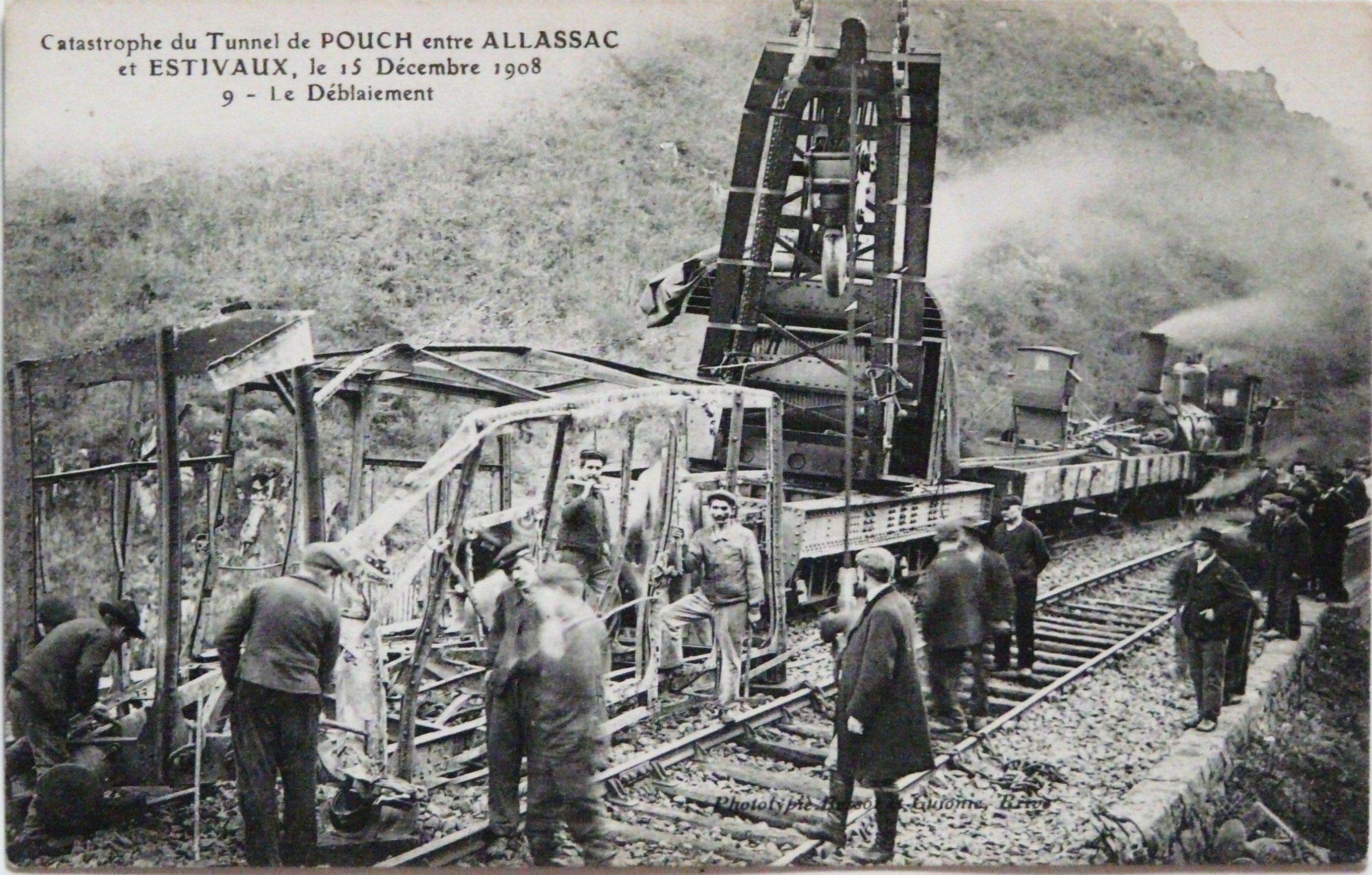 Catastrophe du tunnel de Pouch du 15 décembre 1908 (le déblaiement).